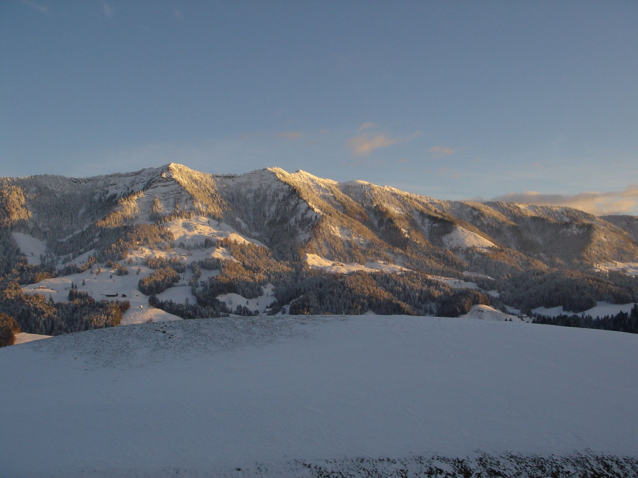 Beichlen im Winter